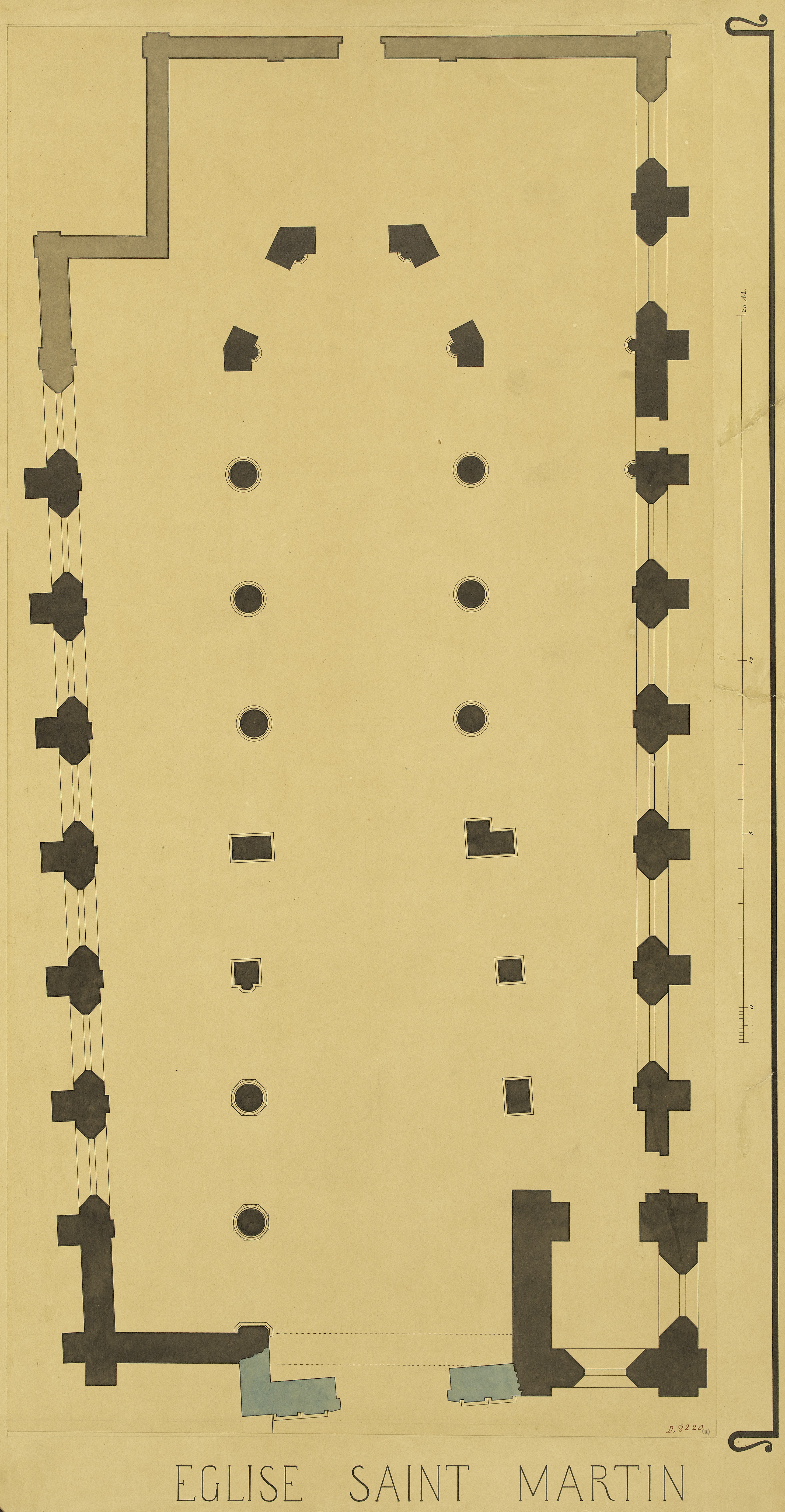 La source écrite la plus ancienne est un document en latin de 1183. Sa construction est datée du XII/XIIIème siècle. Son chœur est en ogive avec boiseries du XVIIIème inscrites à l’inventaire du mobilier historique. Une vierge à l’enfant dite vierge à la rose du XVIème est également inscrite à cet inventaire. La rosace au-dessus du portail représente Saint-Martin partageant son manteau. Une illumination valorise l’architecture du bâtiment, la gestion des différentes sonneries se fait, depuis peu, par un nouveau mécanisme électronique.